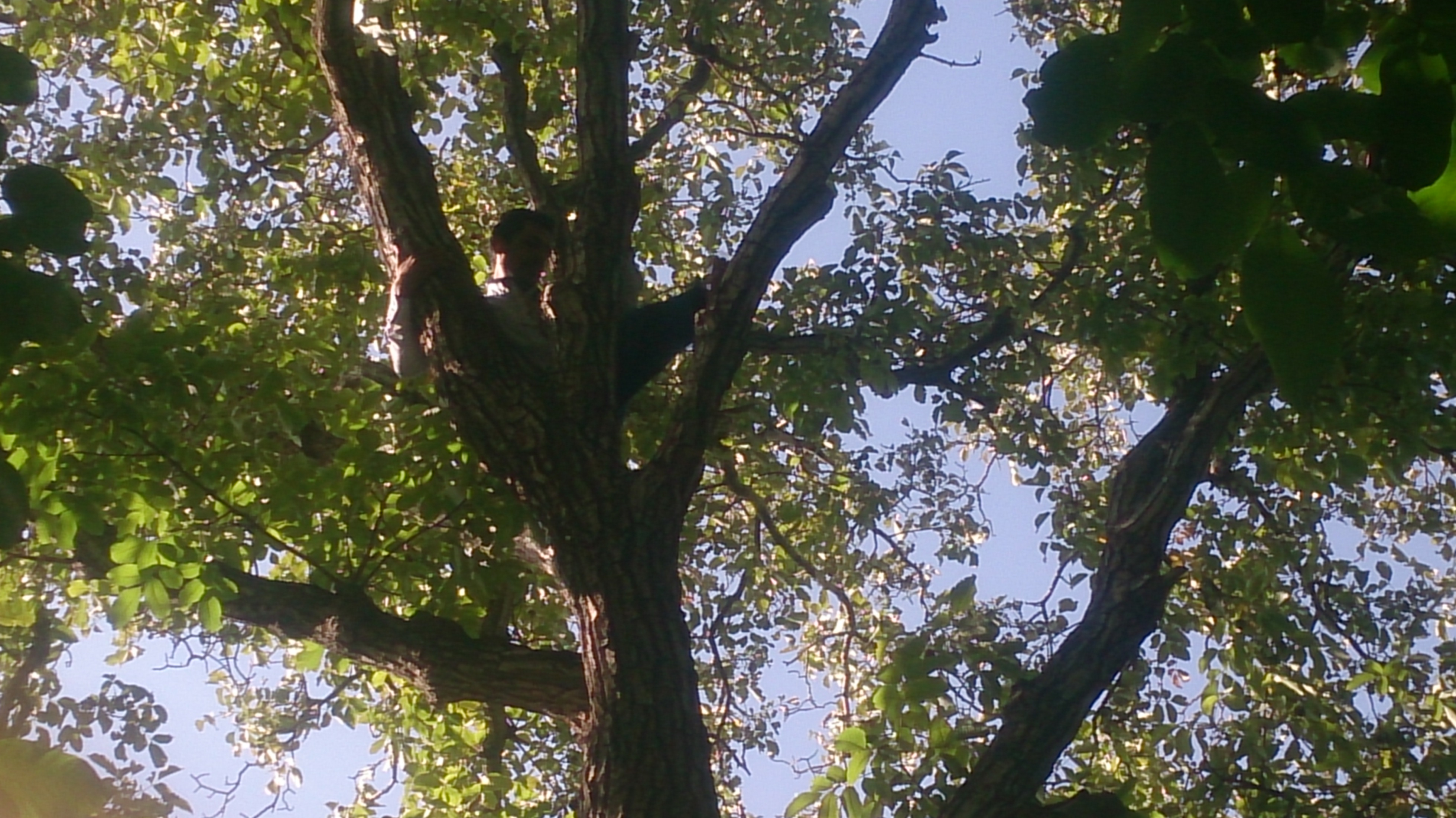 برداشت گردو (گردو تکانی) در روستای دامنه